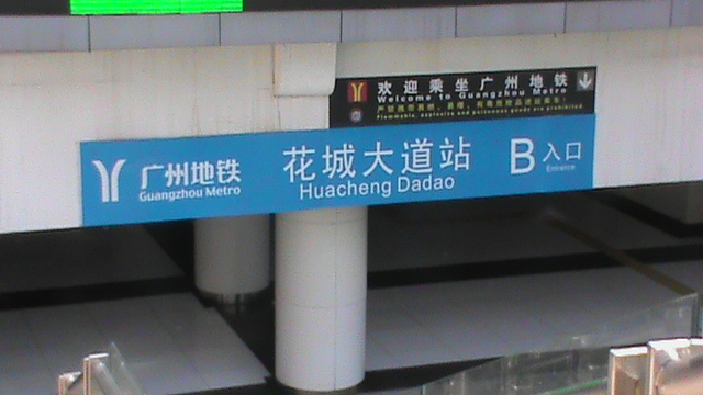 花城大道站B口